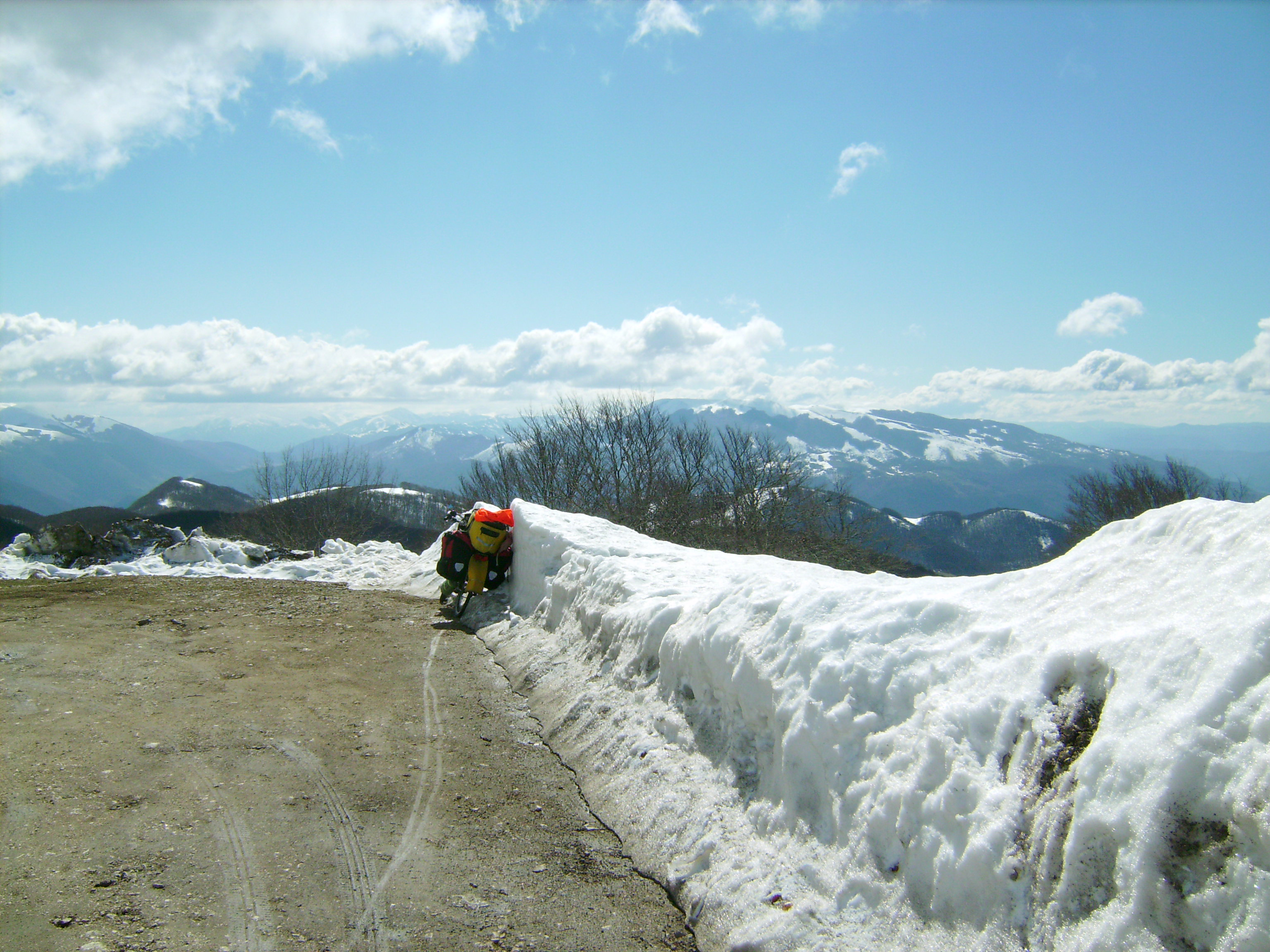 Panorama dei Monti Reatini scattato dal Terminillo, a 1696 metri di quota, dalla strada panoramica circolare "via dell'Anello" che inizia e finisce a Campoforogna